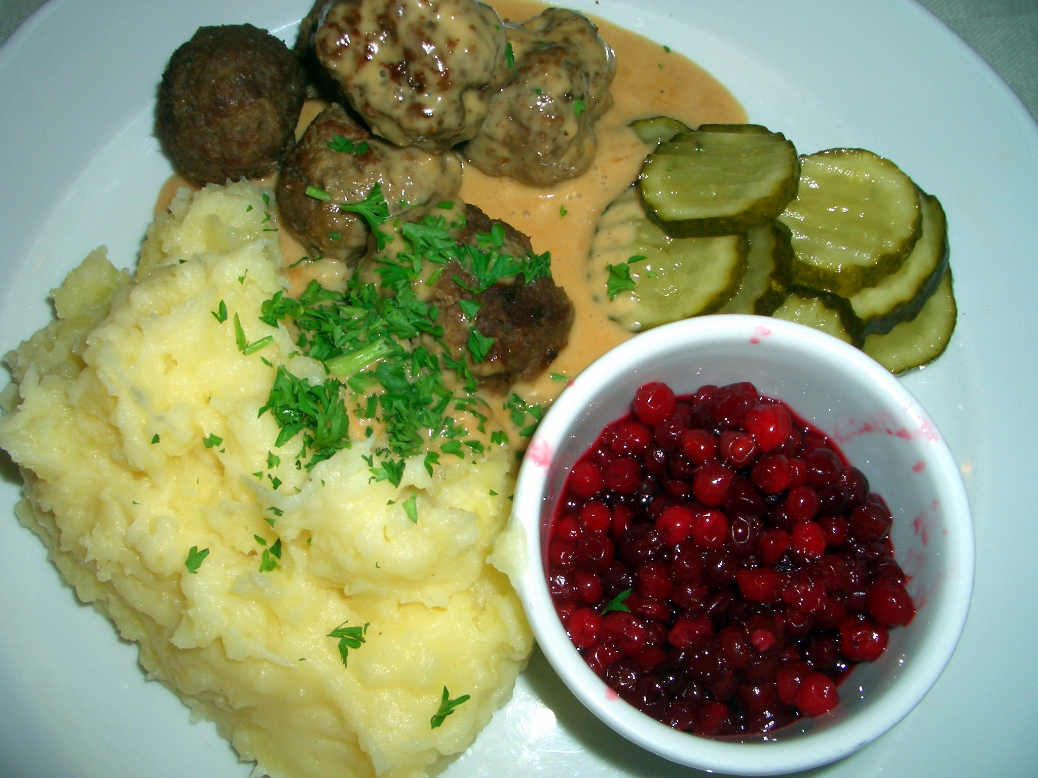 swedish köttbullar